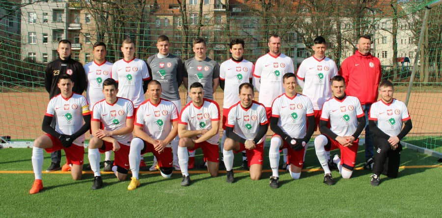 Pierwszy skład FC Polonii Berlin w sezonie 2017/2018.